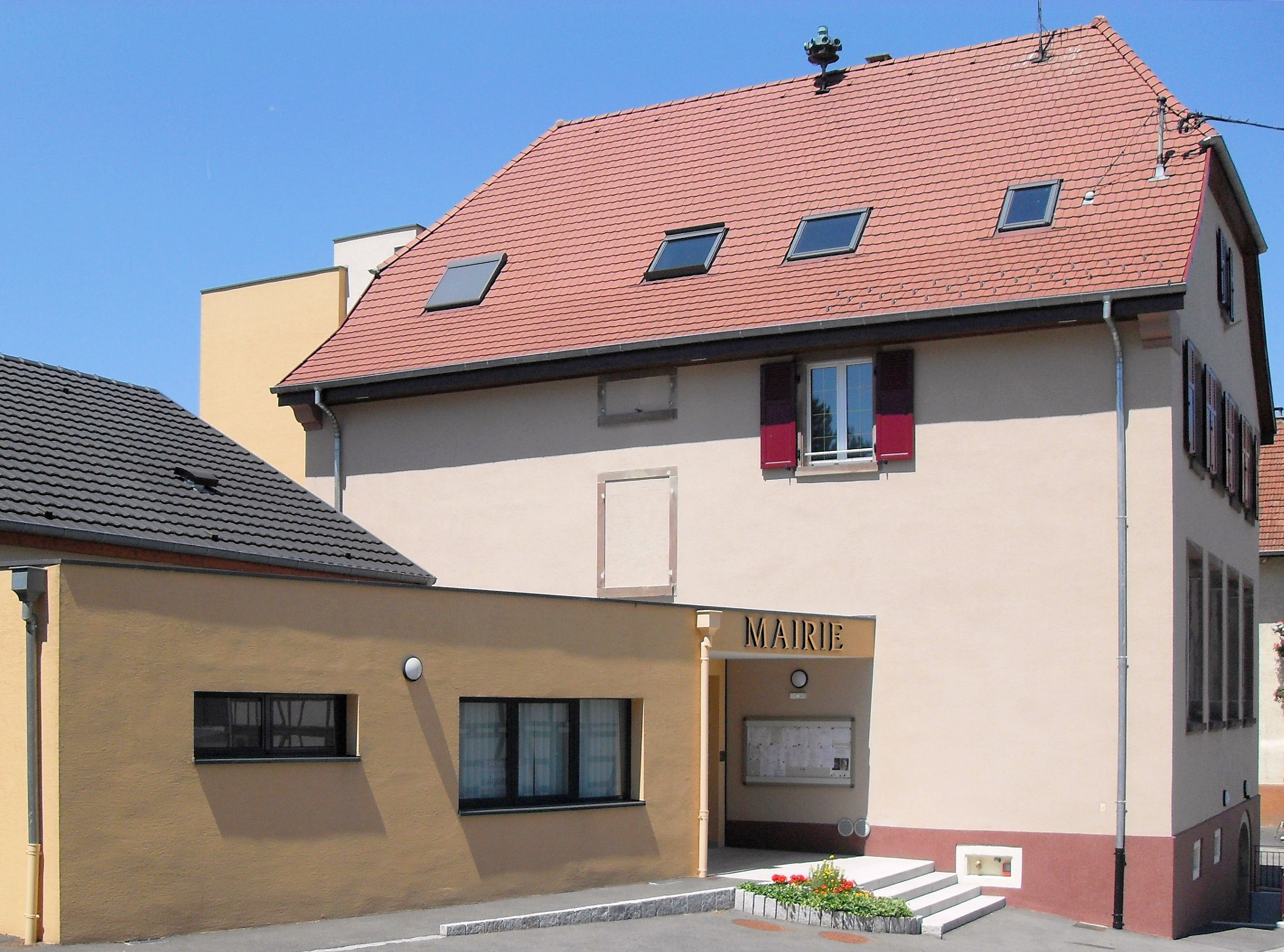 La mairie d'Eglingen